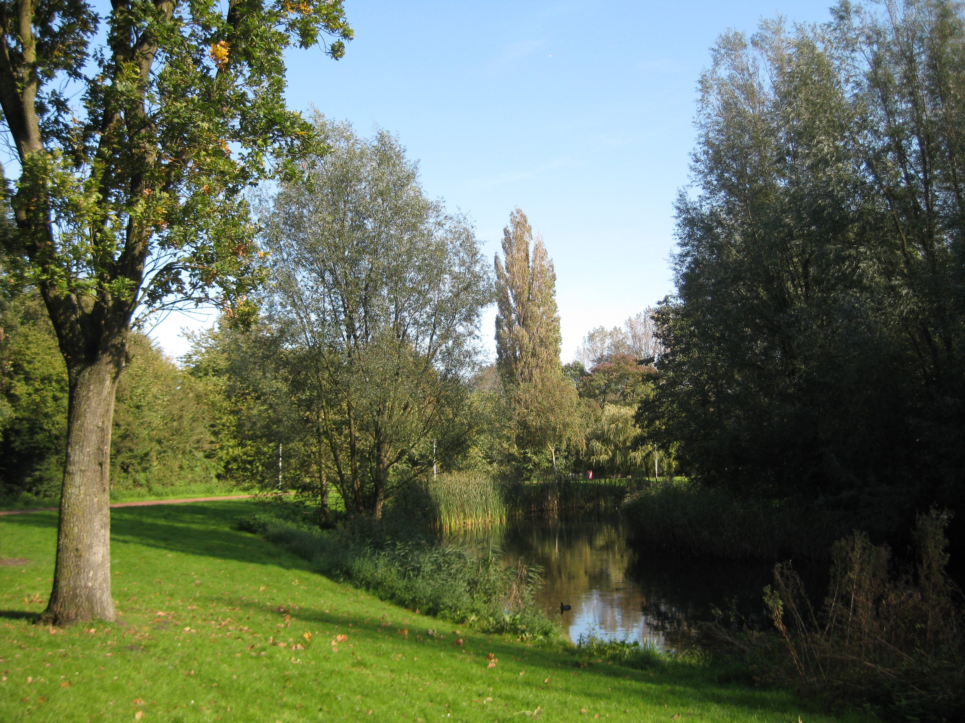 Florapark